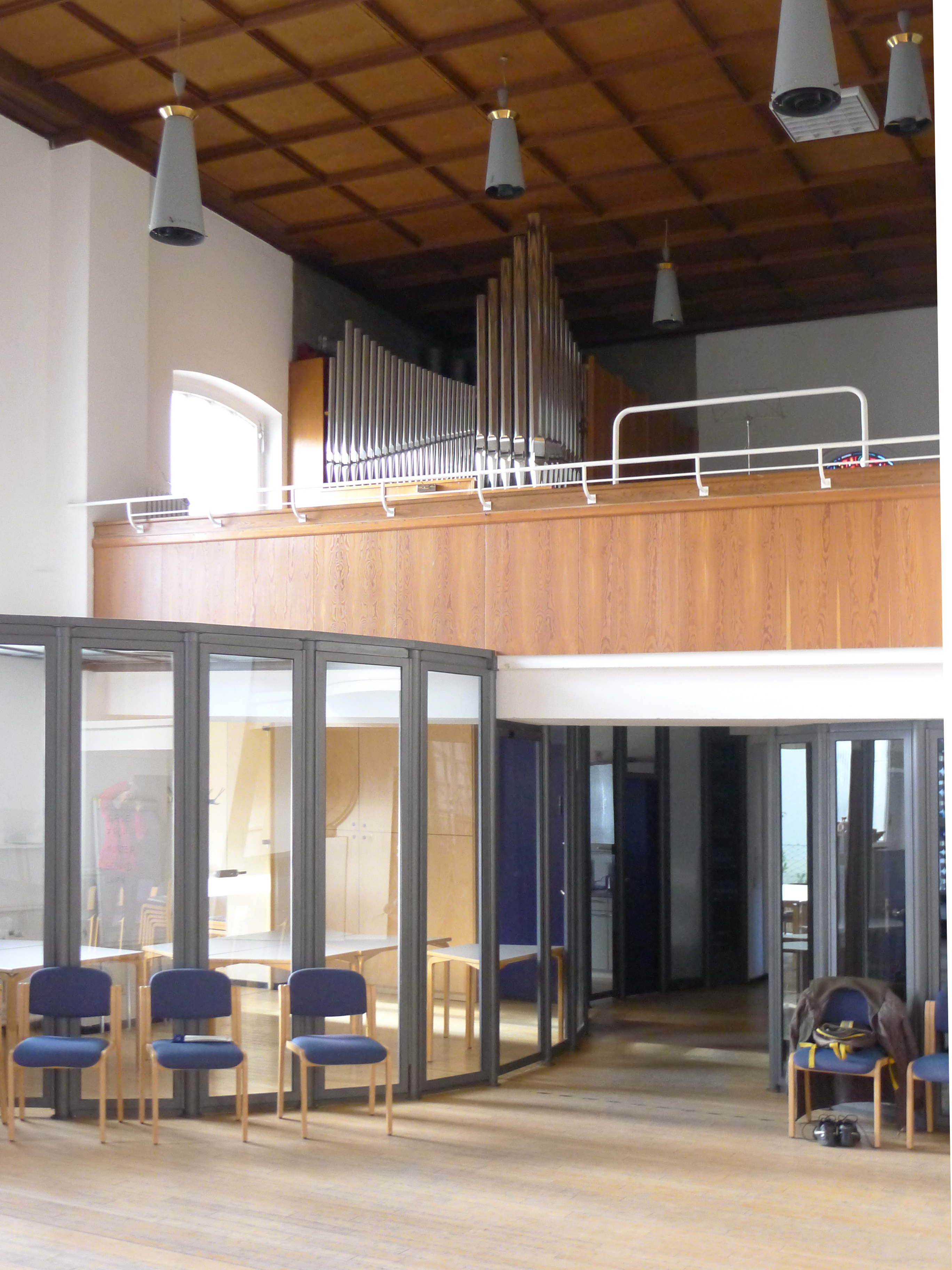 Orgelempore über der Eingangshalle